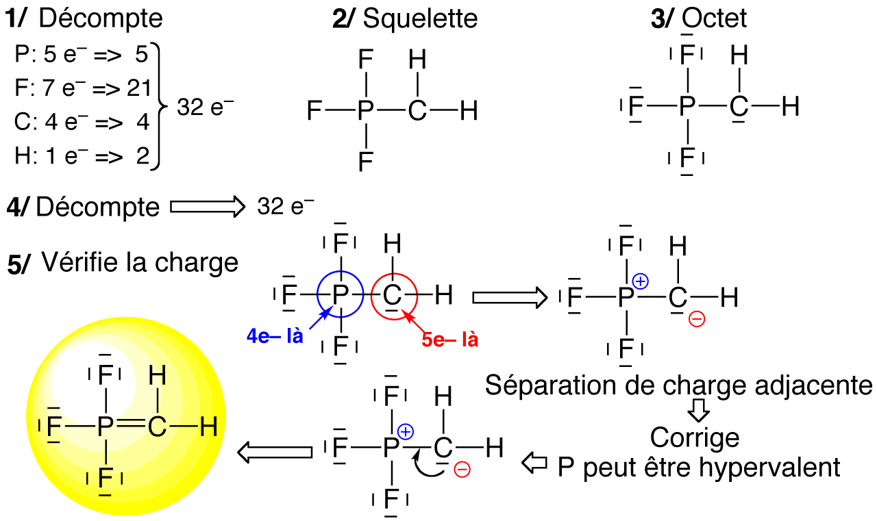 suite du fichier 1 autre exemple pour la construction systématique de structure de Lewis